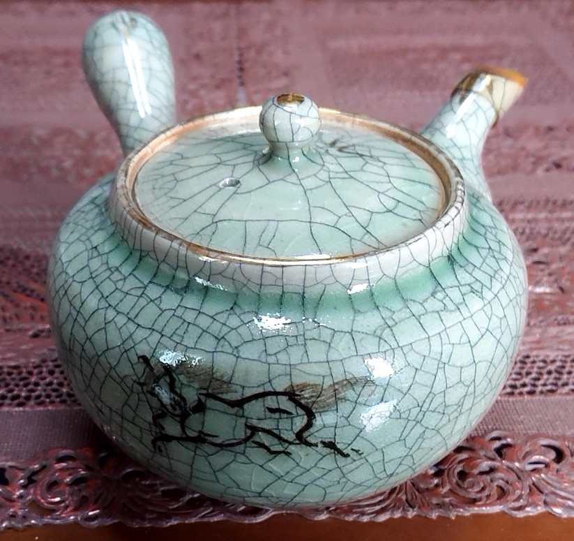 福島県相馬地方特産の陶磁器